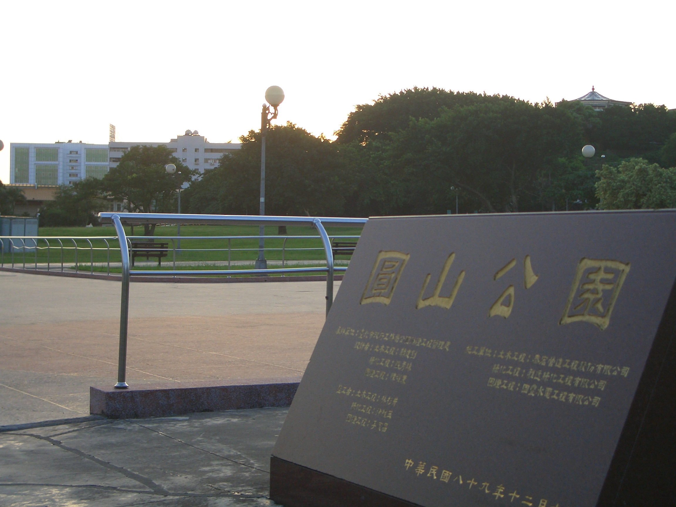 台北市圓山公園入口